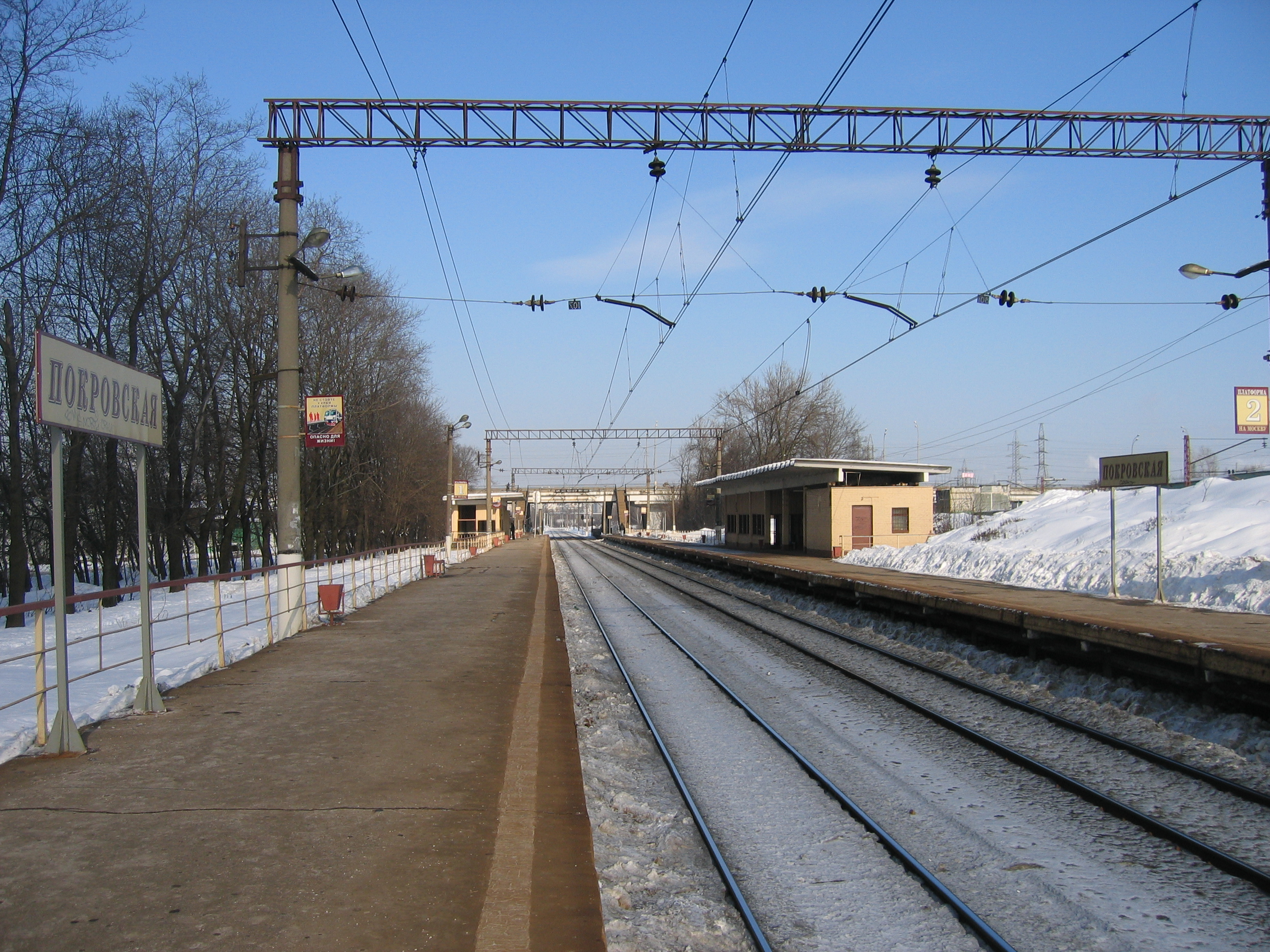 Железнодорожная платформа Покровская в Москве